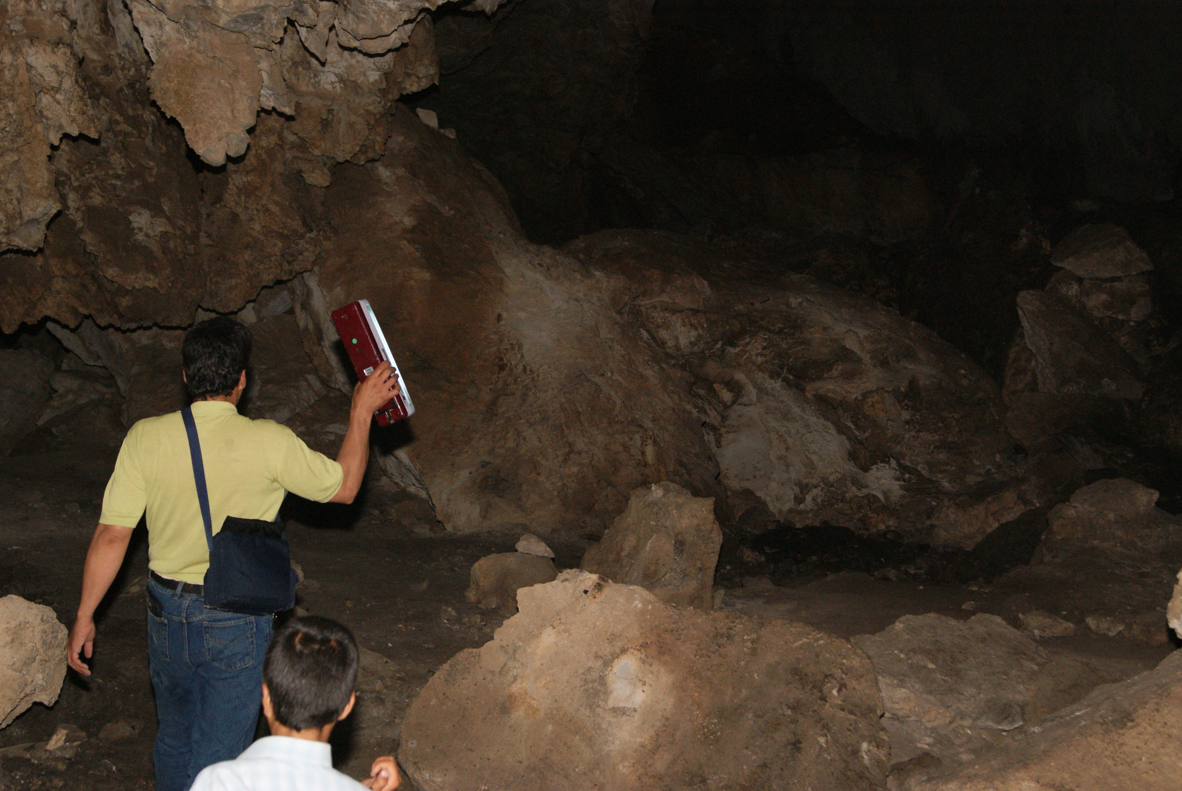 بعد از عبور از ورودی دوم و پیمایش حدودا ۶۰ متر از این محل عبور خواهید کرد